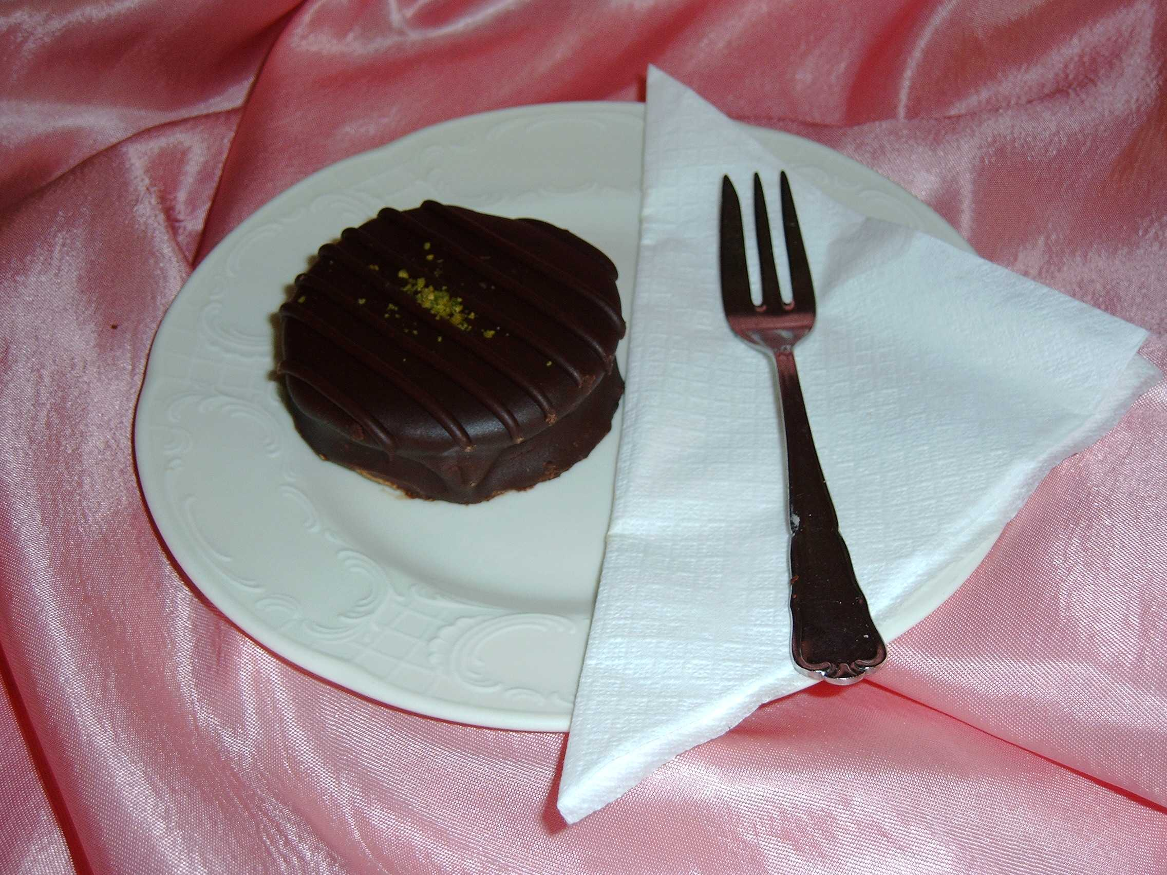 Schoko Ischler Törtchen von der Konditorei Zauner in Bad Ischl (Österreich)